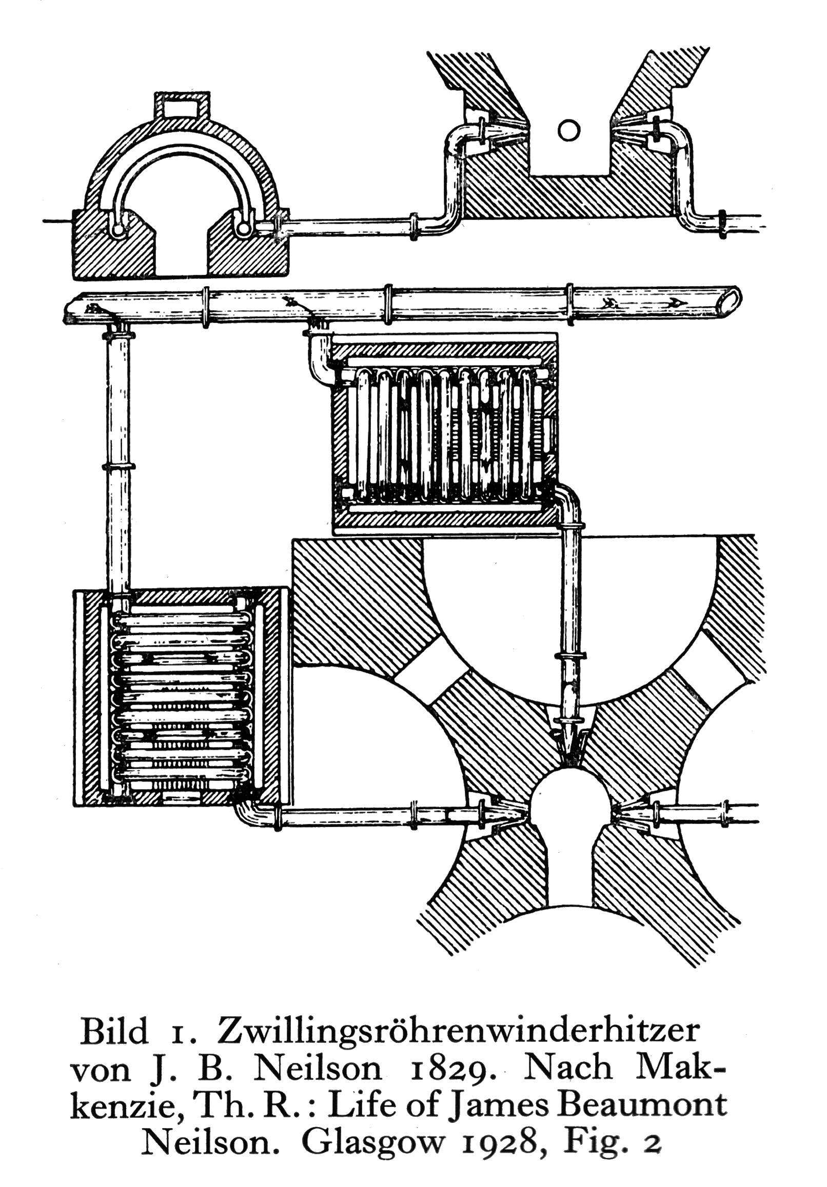 Heberöhren- oder Hosenröhren- Winderhitzer (auch Calder-Apparat) von James Beaumont Neilson Original Beschreibung: Zwillingsröhrenwinderhitzer von J.B. Neilson 1829. Nach Makkenzie, Th. R.: Life of James Beaumont Neilson. Glasgow 1928, Fig. 2